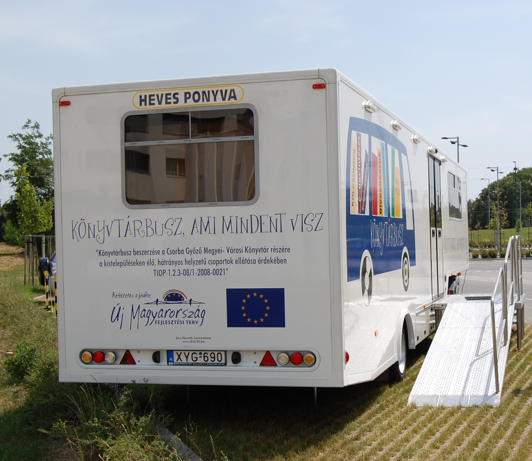 Könyvtárbusz a Baranya megyei kistérségek ellátására. A megvalósítás a TIOP-1.2.3-08/1-2008-0021 kódszámú projekt keretében történt. Ellátást működteti: Csorba Győző Megyei-Városi Könyvtár - Pécs, Dél-dunántúli Regionális Könyvtár és Tudásközpont.